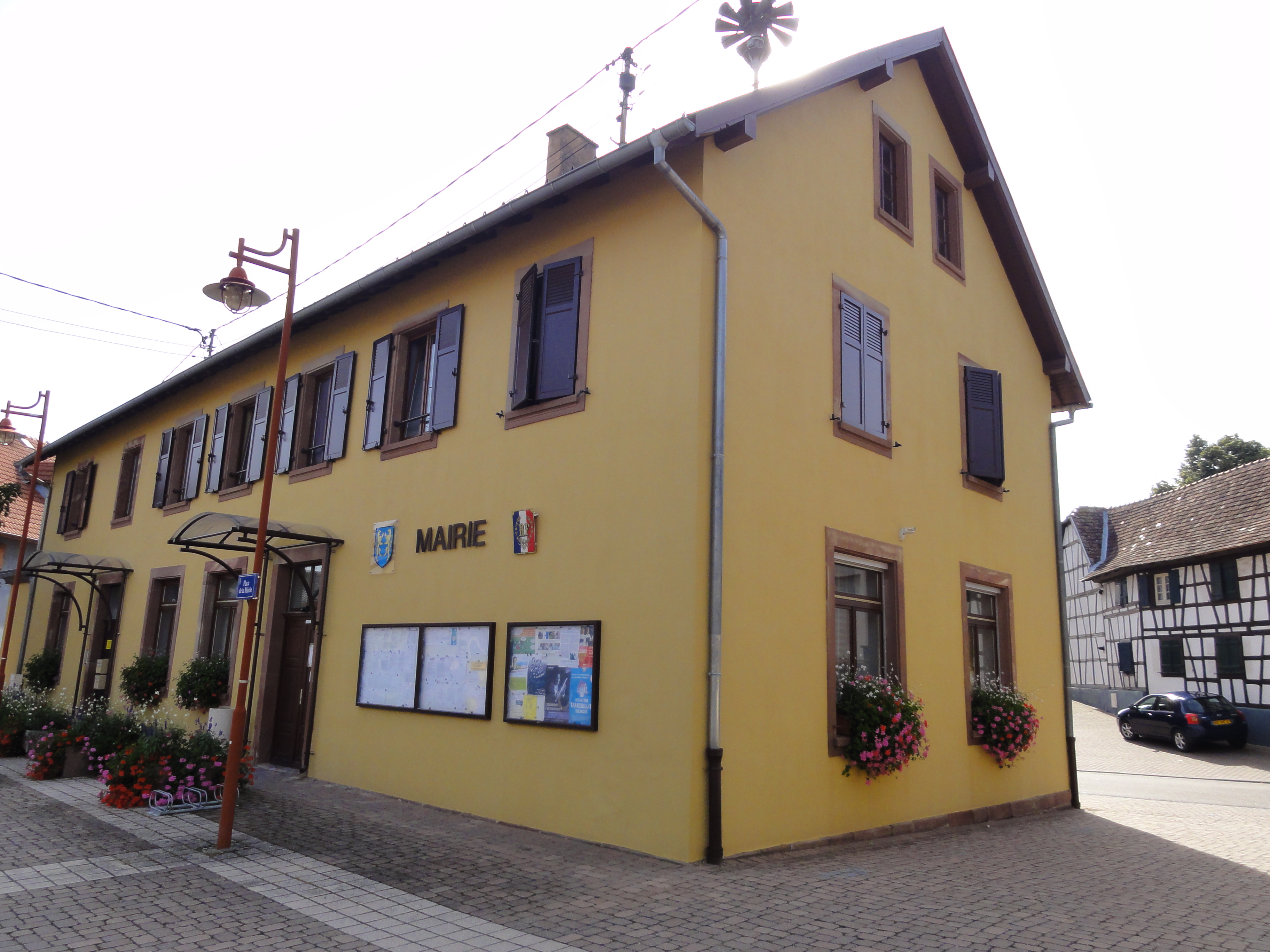 Alsace, Bas-Rhin, Dingsheim, Mairie-école (1877-1926). .